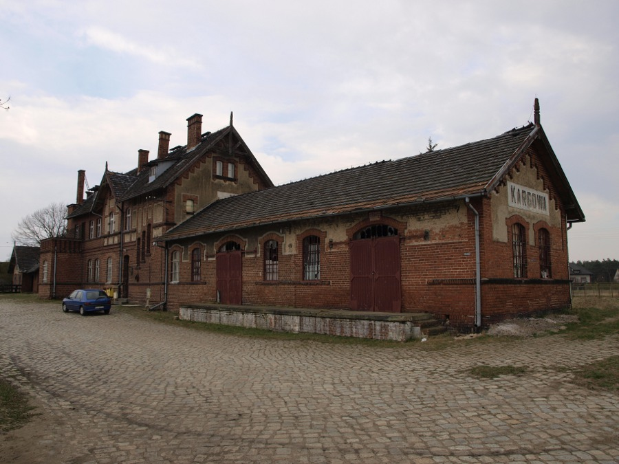 Dworzec kolejowy z miejscowości Kargowa, widok od strony drogi